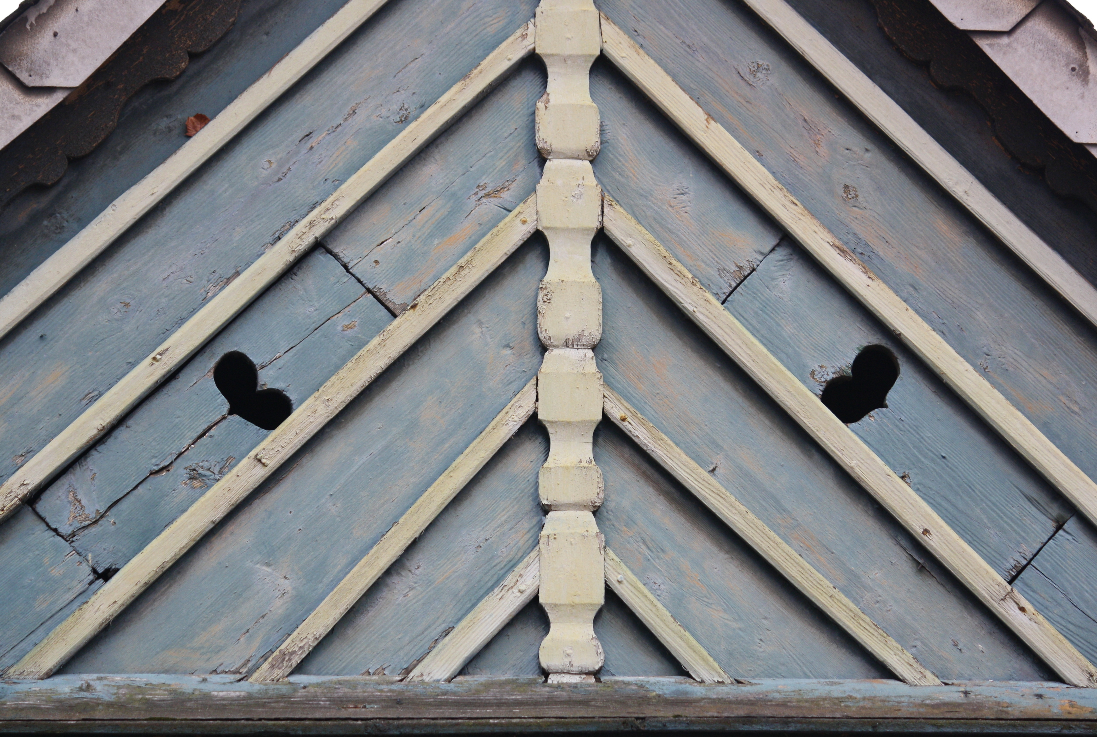 Zahrádky - lidové stavení (detail lomenice)